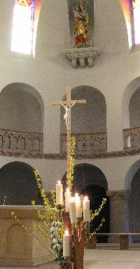 Abbaye Notre-Dame d'Oelenberg - intérieur de l'église